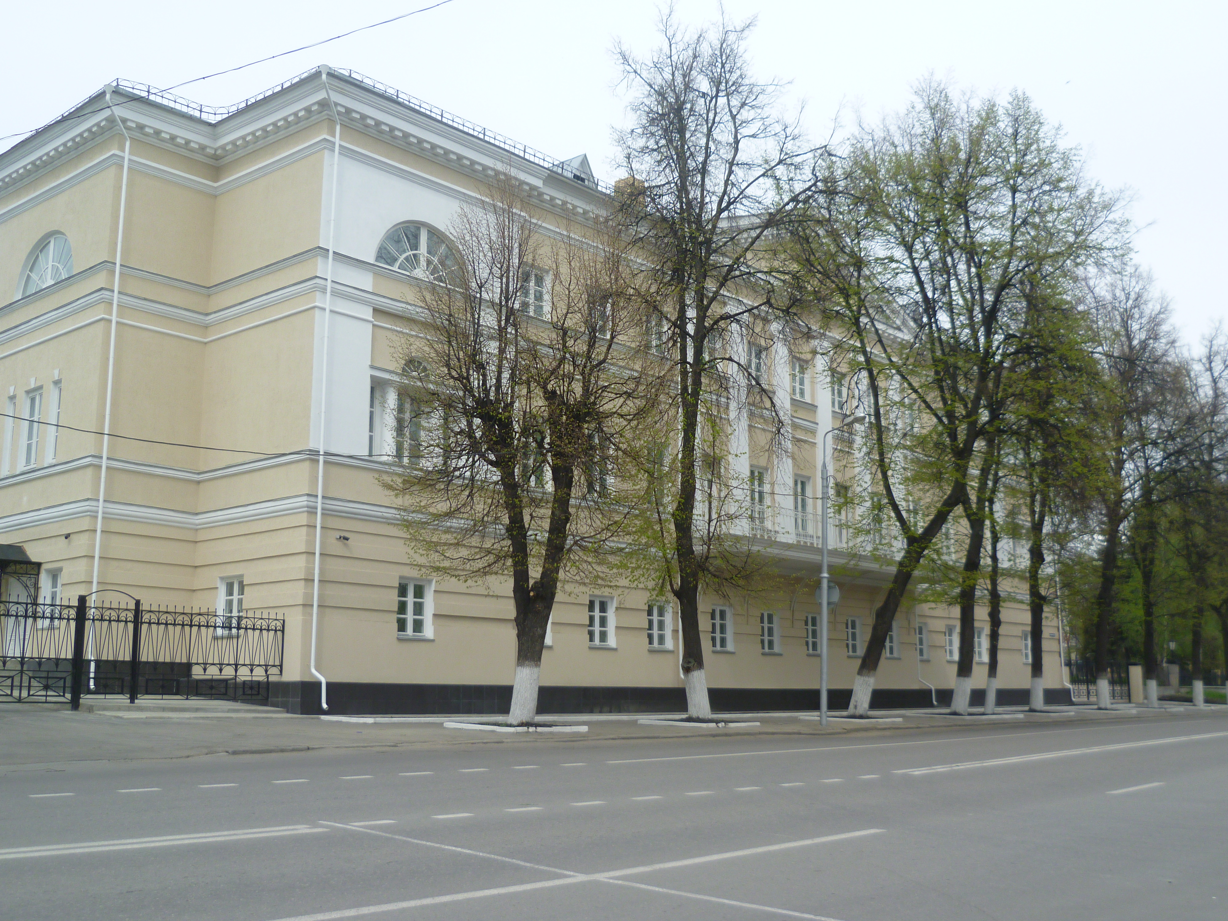 Губернаторский дом на Советской улице ПензыUnknownUnknown governor's house on sovietskaya street of penza city